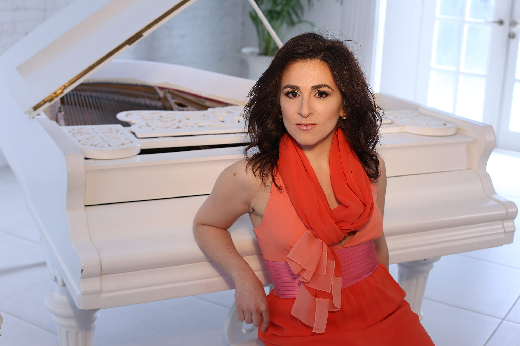 Die Pianistin Lilian Akopova